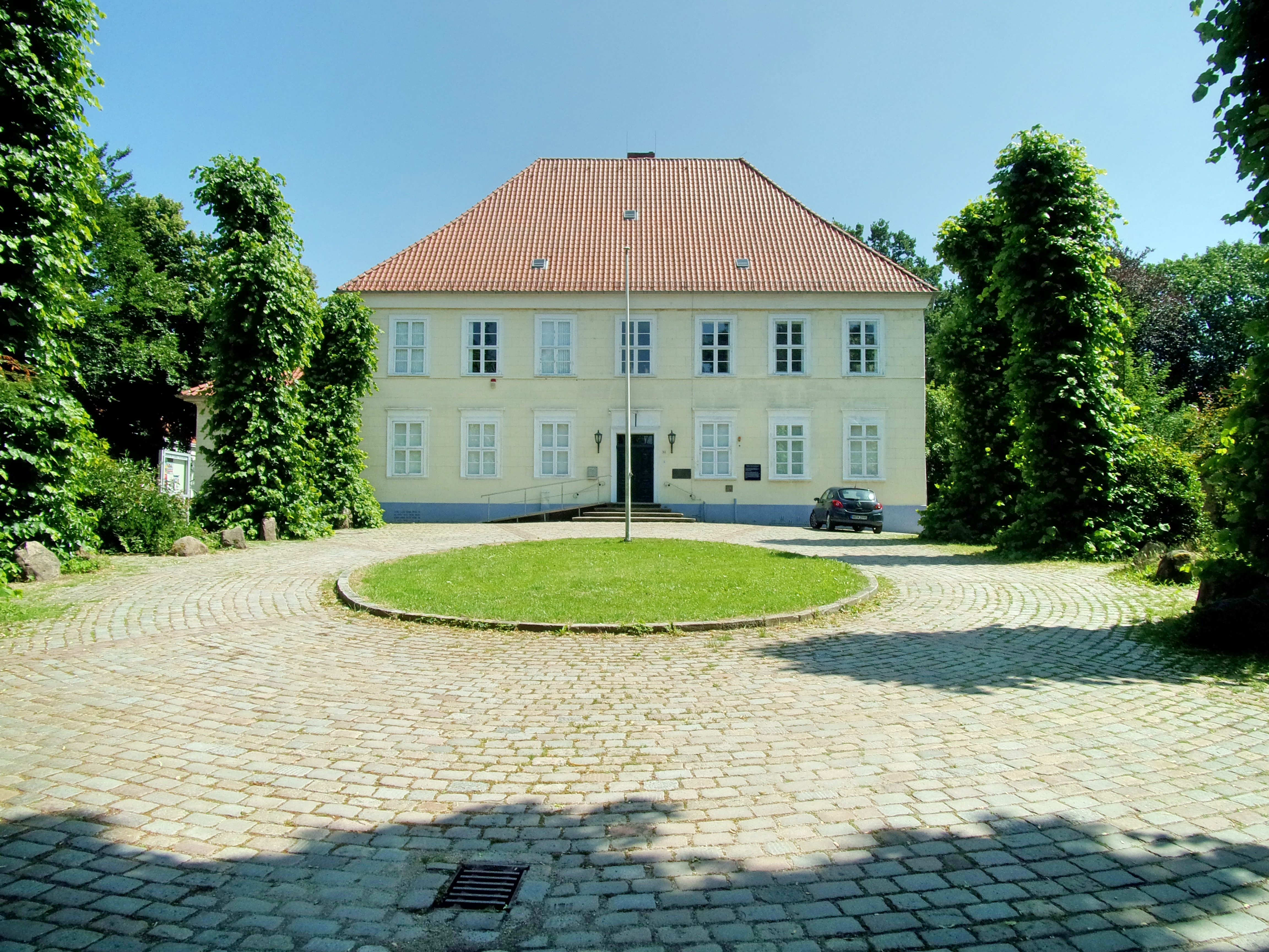 Museum Elbinsel Wilhelmsburg. Ehemaliges Amtsgebäude, erbaut 1724 auf den Grundmauern einer ehemaligen Burg und Verwaltung der damaligen Herrschaft ( Quelle: Tafel der HPA vorm Museum ). Heute fungiert es als Heimat-Museum. Zum denkmalgeschützten Ensemble gehört der Garten sowie der benachbarte Friedhof. This is a photograph of an architectural monument.